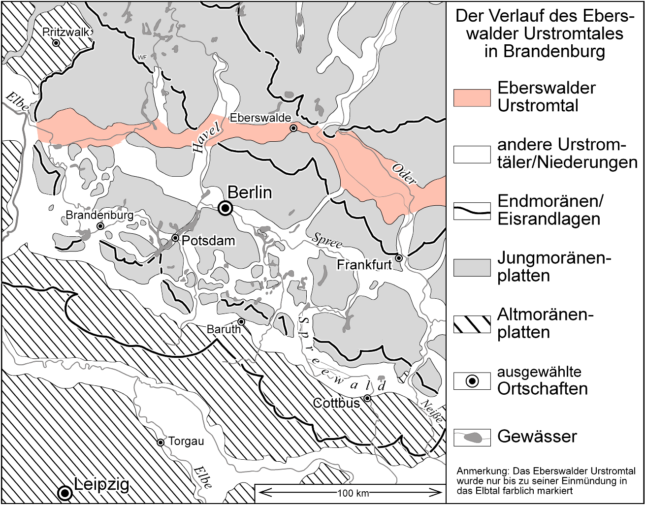 Der Verlauf des Eberswalder Urstromtales in Brandenburg